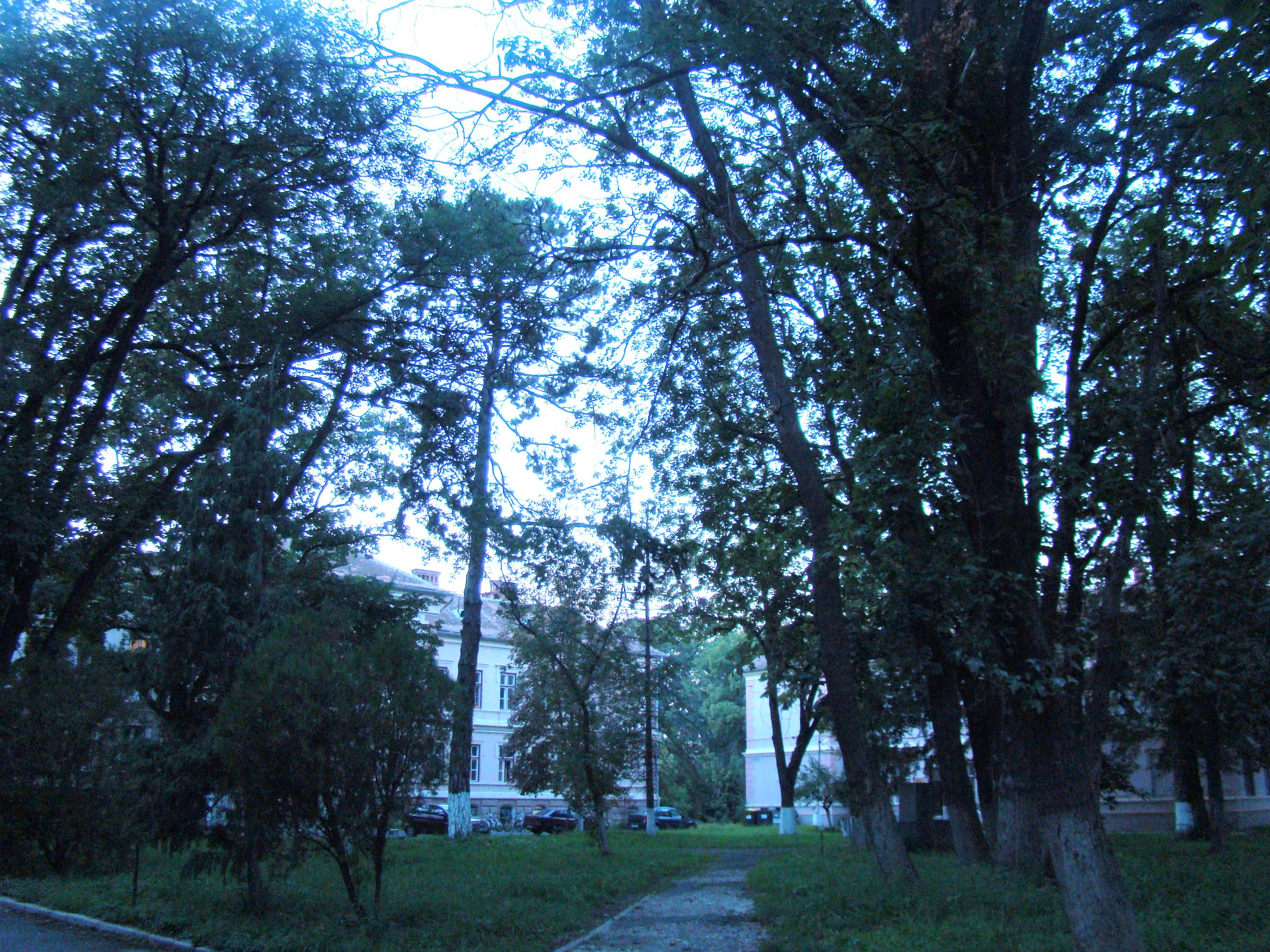 Ansamblul fostului seminar evanghelic din Sibiu (Parcul) 06